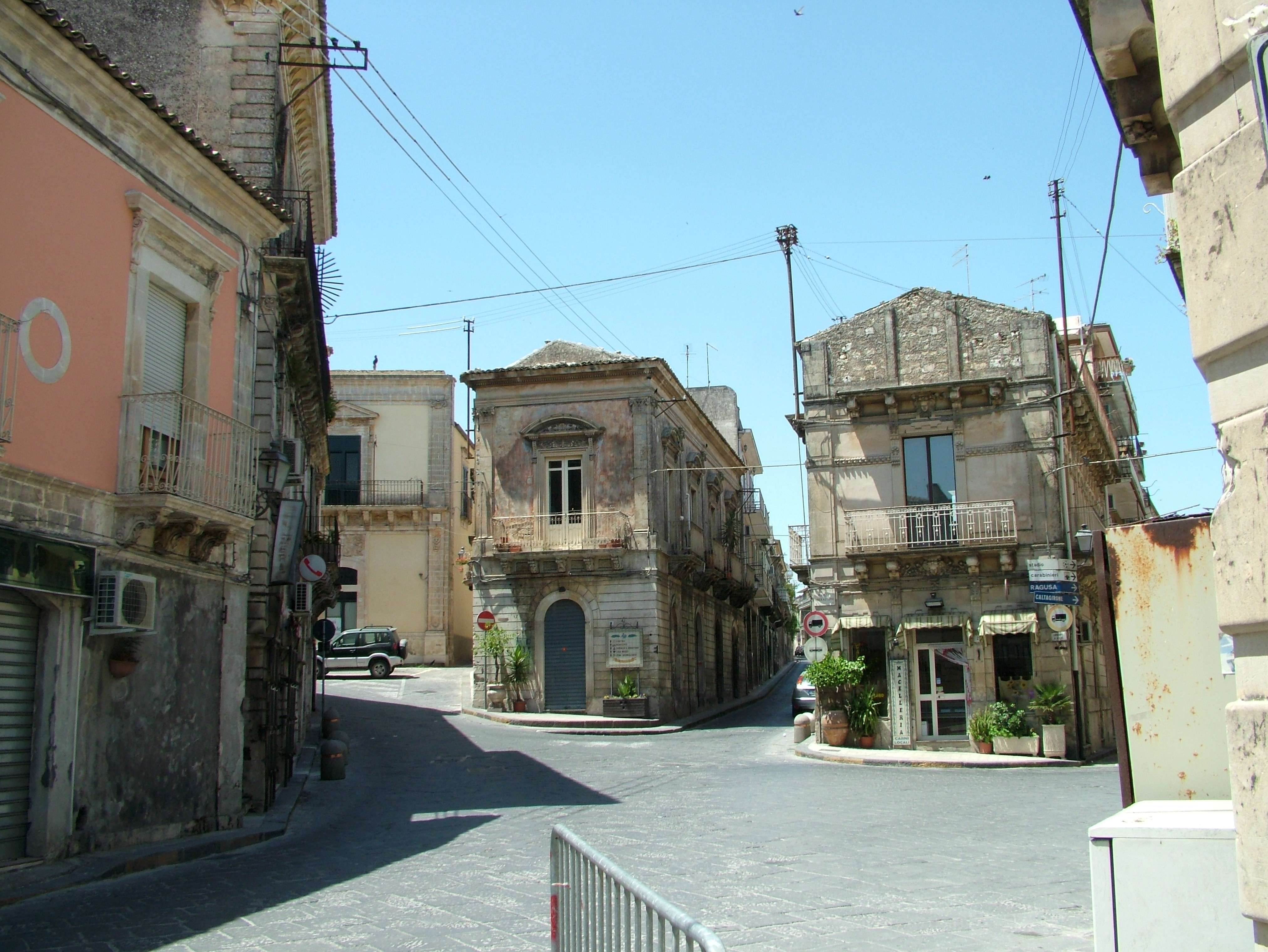 Palazzolo Acreide, Sizilien, eine Straße